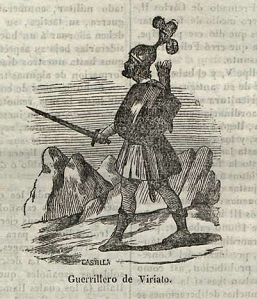 Guerrero de Viriato, dibujo firmado por «Castilla», recogido en la publicación Semanario pintoresco español.